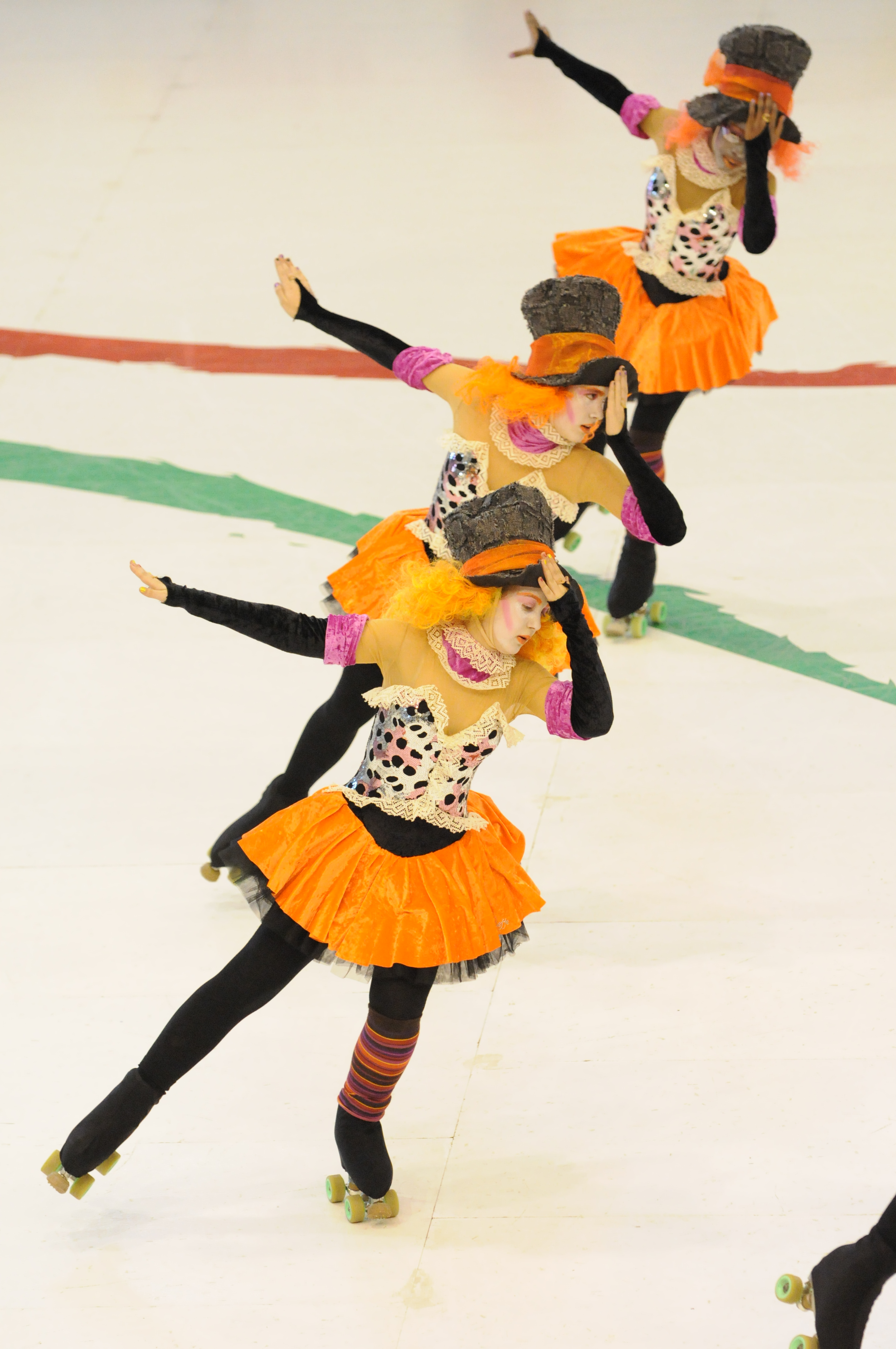 Pattinaggio artistico a rotelle - Gruppi spettacolo - Campionato Nazionale Italiano 2011 di Reggio Emilia - Gruppi Jeunesse - Spirito Libero - Il cappellaio matto